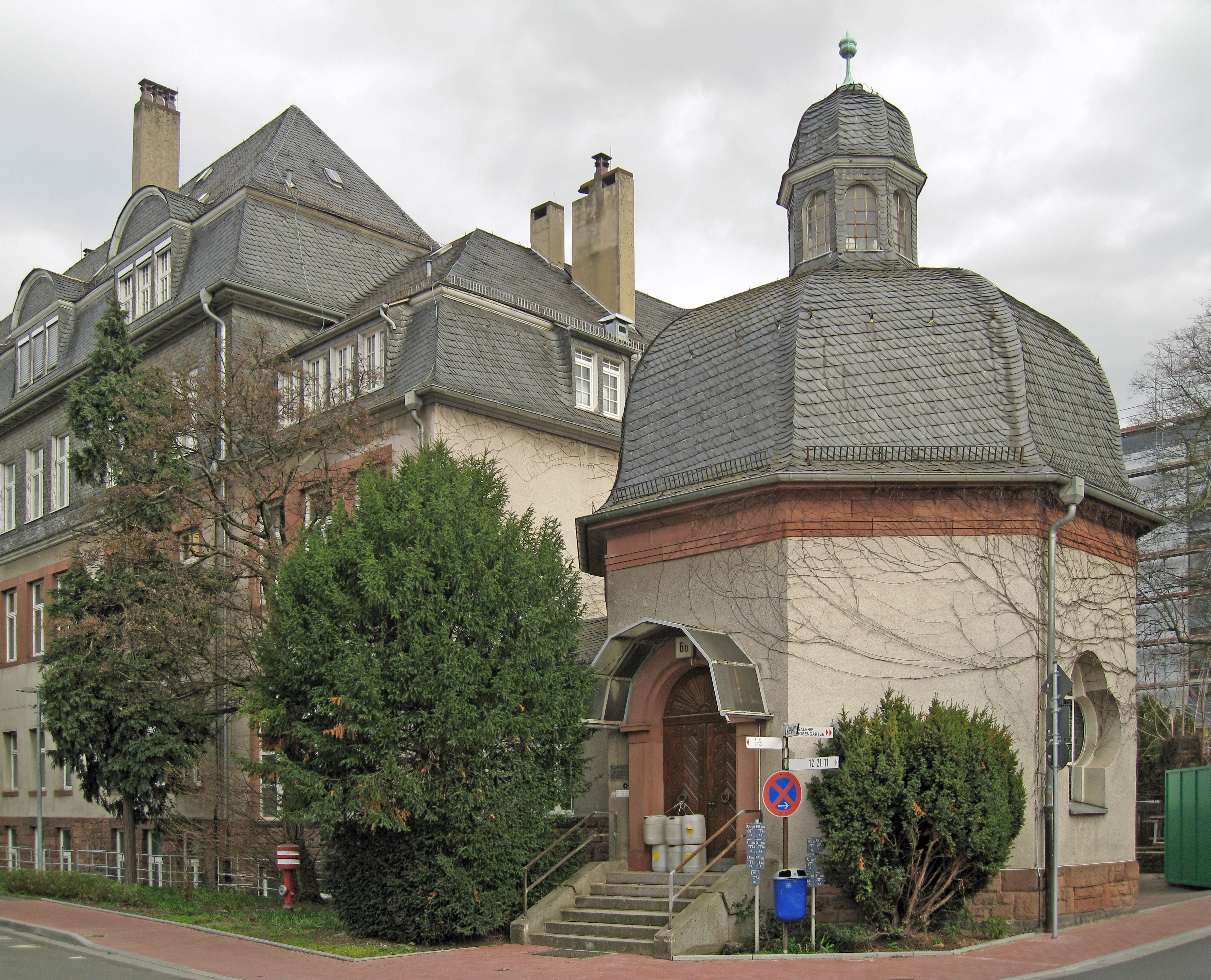 University hospital Frankfurt Universitätsklinik Frankfurt am Main: Kapelle